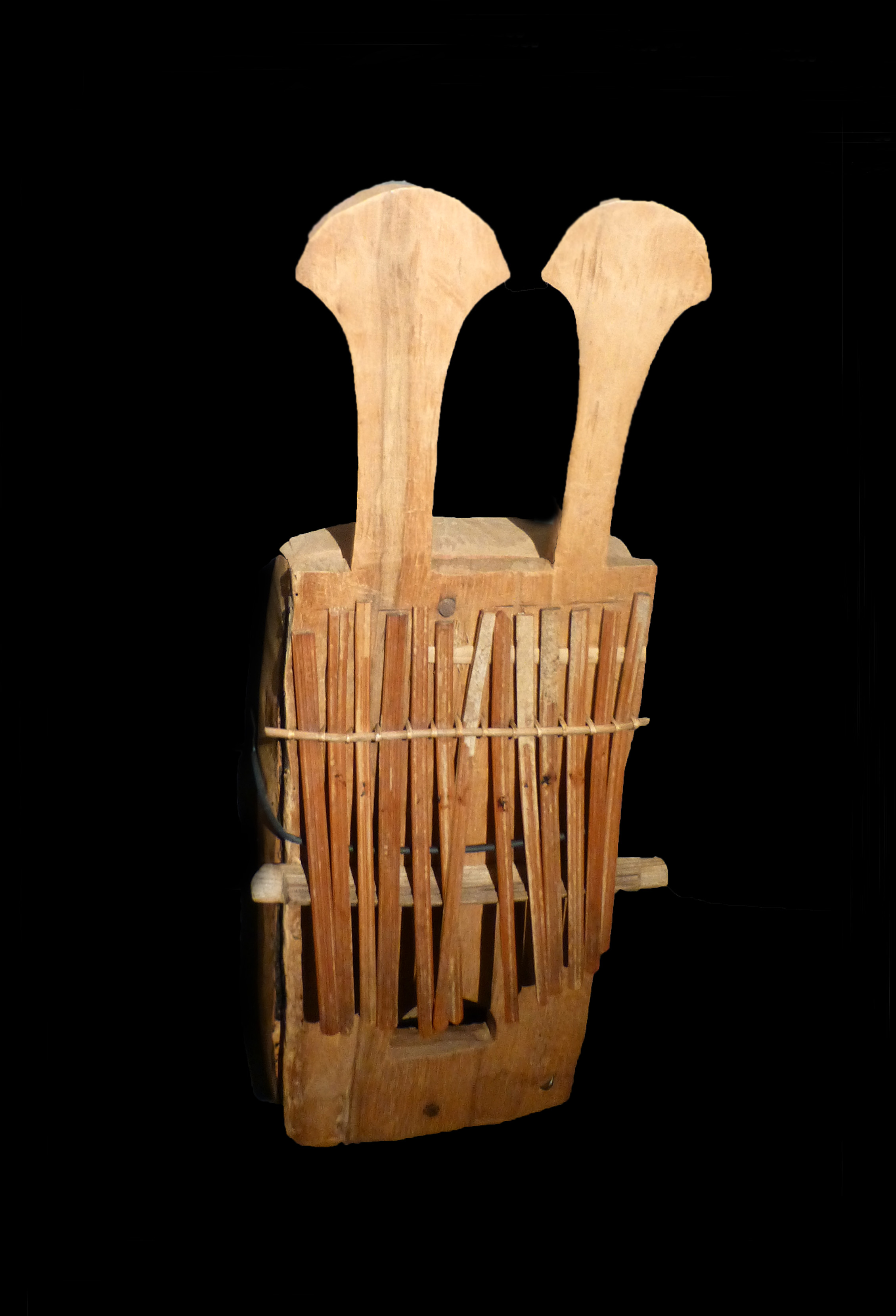 Résonateur sanza ou lamellophone. Bois, Bambou. Gabon. Musée d'histoire naturelle et d'ethnographie de Colmar N° d'inventaire : 996.279